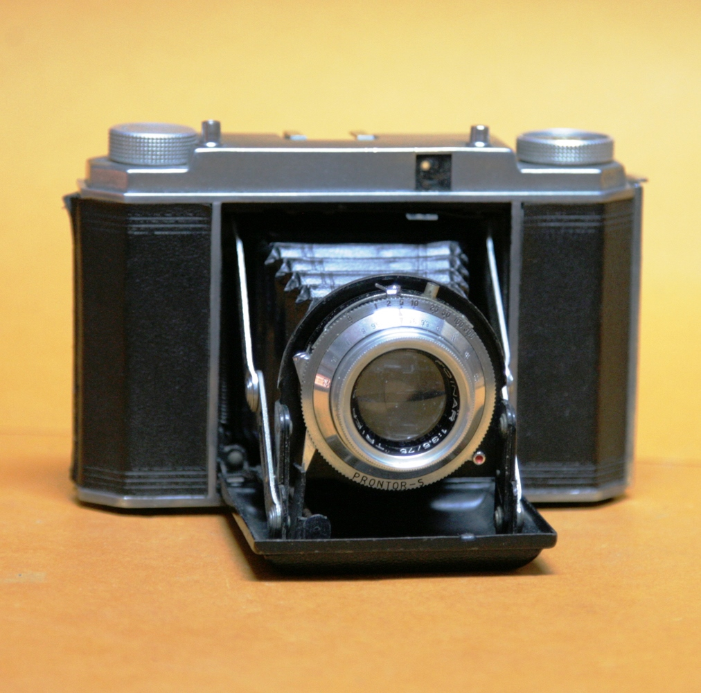 Coll. Marcè CL - Foitzik Kamerawerke mod. Foinix 1954 , obiettivo Foinar 1:3.5 / 75mm, ottturatore Pronto shutter